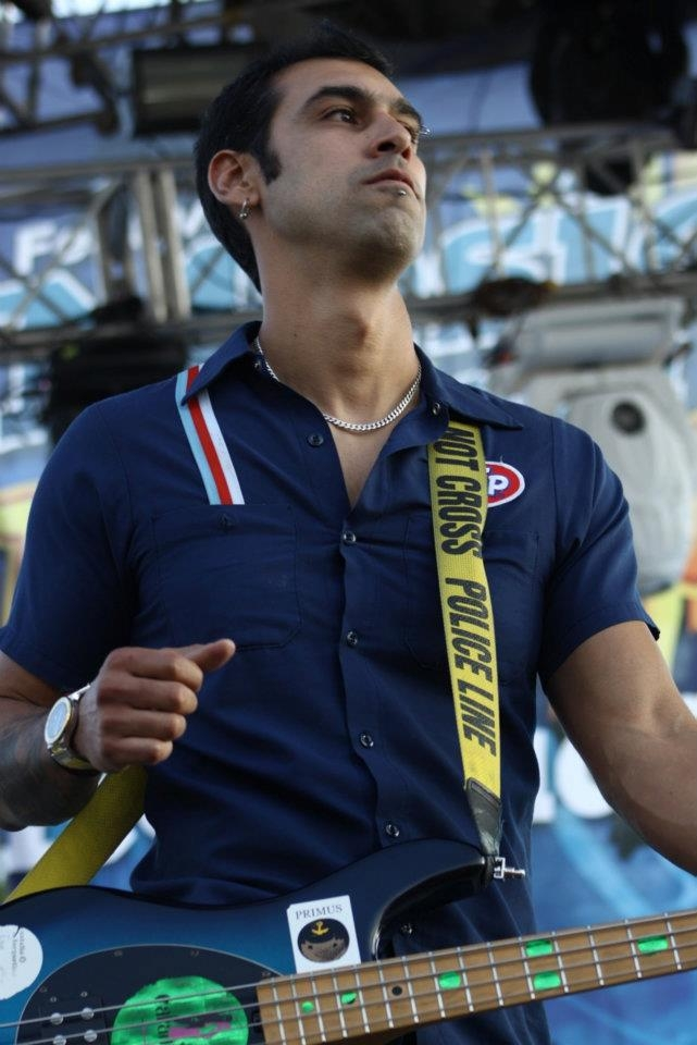 Chanona durante una presentación en vivo